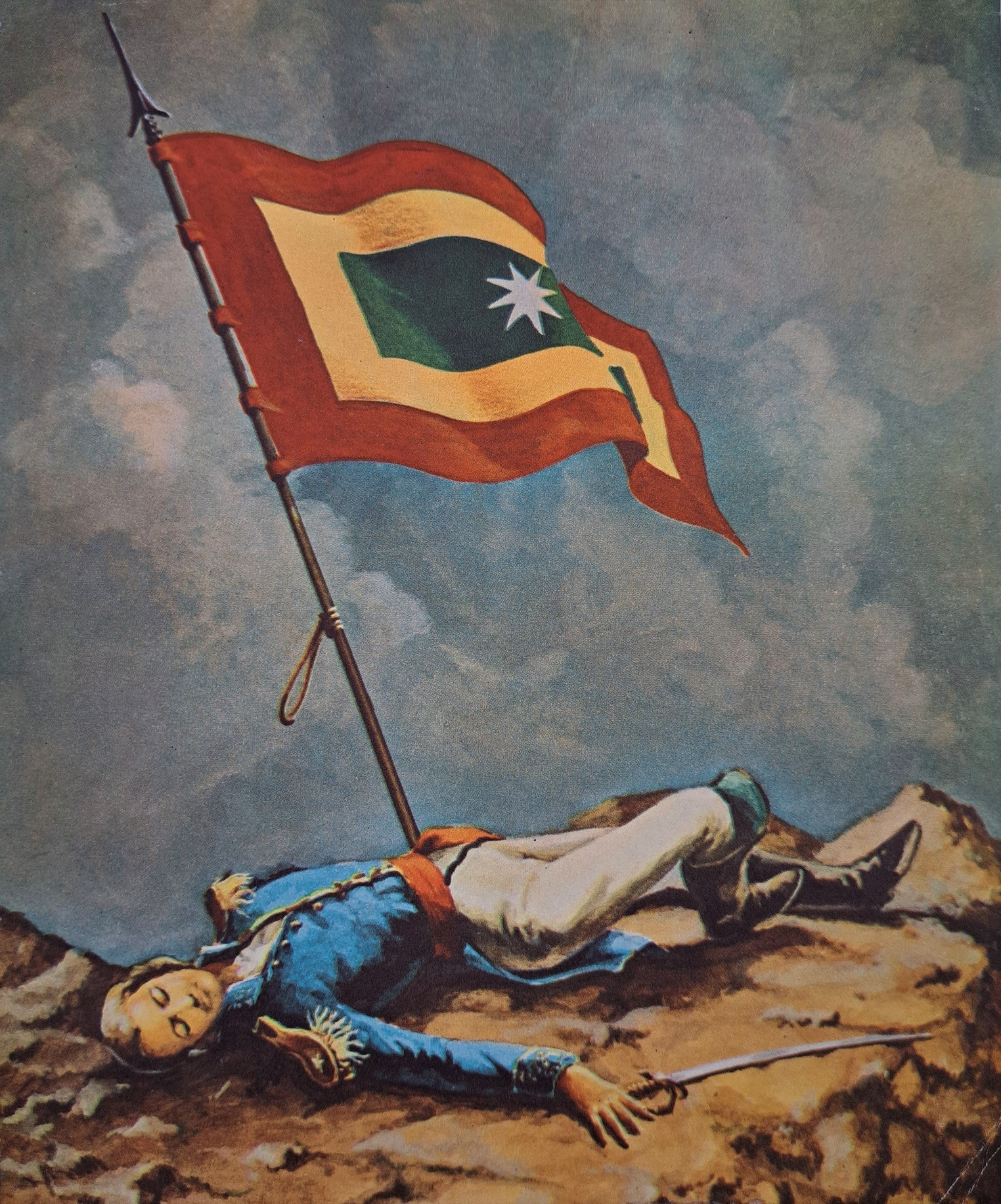 Muerte del coronel Atanasio Girardot en la cima del bárbula llevando la bandera de Cartagena el 30 de septiembre de 1813, día que pasó a la gloria al plantarla y luego morir en la cima del Bárbula